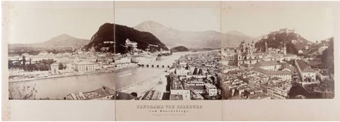 Friedrich Karl Würthle unter Mitarbeit von Gregor Baldi, Panorama von Salzburg, vom Mönchsberge, Albumendrucke, Triptychon, 20 x 72 cm